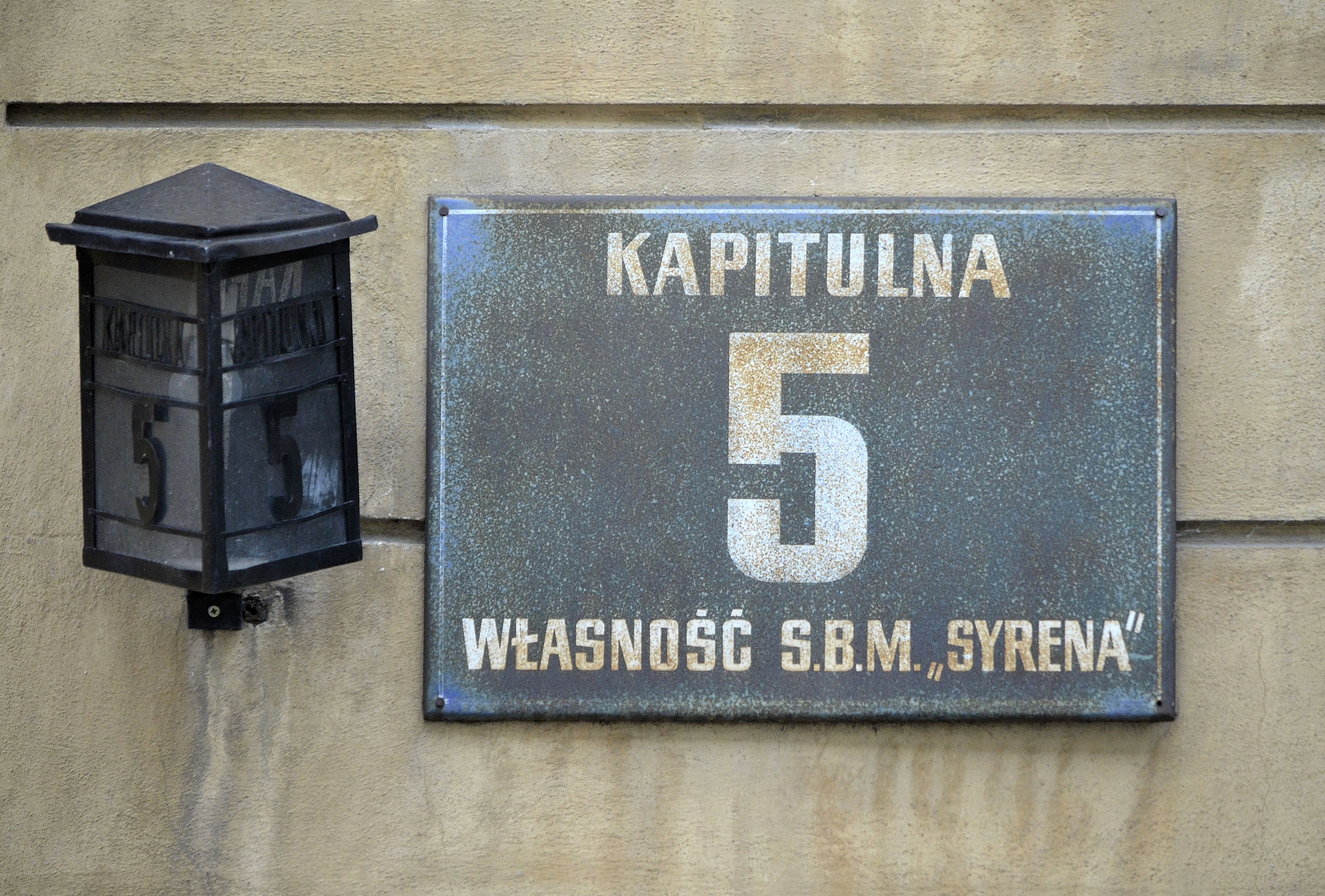 Tablica adresowa starego wzoru przy ul. Kapitulnej 5 w Warszawie